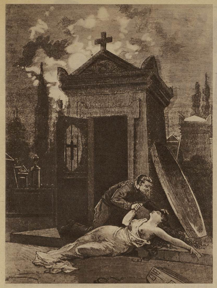 Le Vampire, gravure extraite des Mémoires de M. Claude, chef de la police de sûreté sous le second Empire (Paris, Jules Rouff, vers 1880) et reproduite dans la revue Détective, n° 410 (3 septembre 1936).